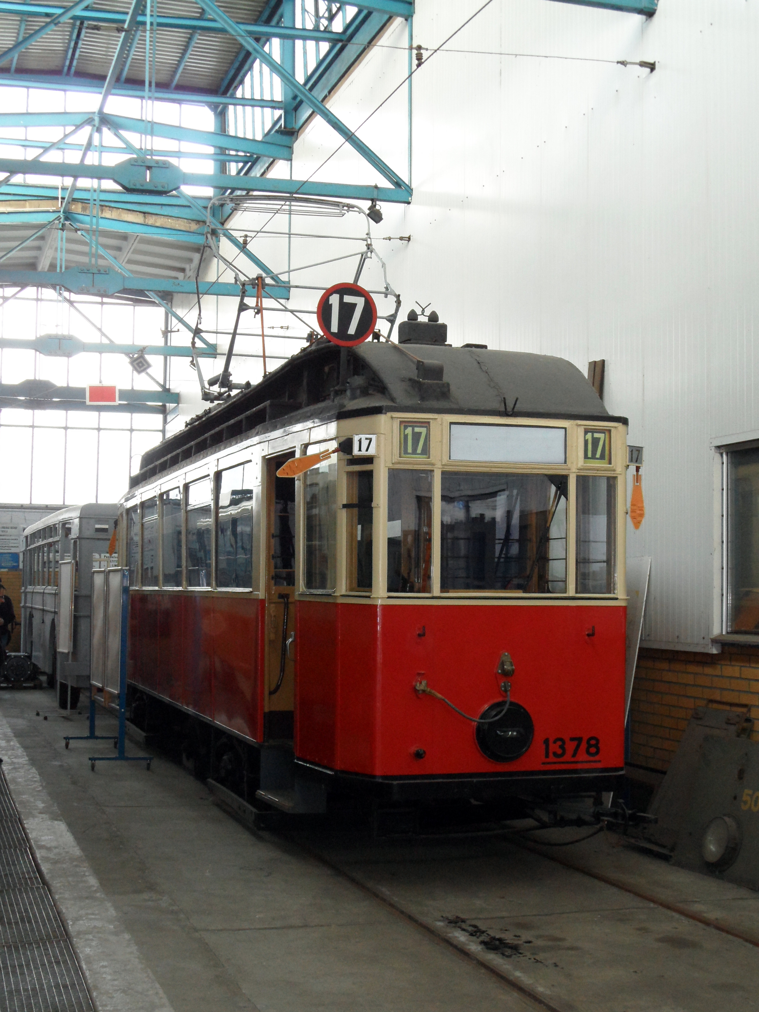 ehemaliger Maximum-Triebwagen der »Leipziger Außenbahn AG«, 1943 auf Lenkdreiachslaufwerk Bauart Westwaggon umgebaut (Typ 24a) und dabei auch äußerlich moderenisiert, im Zustand der Zeit des Zweiten Weltkrieges (Tarnscheinwerfer, abgedunkelte Seitenscheiben). Das Fahrzeug wurde nach seiner Ausmusterung 1978 abgestellt und ab ca. 2000 betriebsfähig restauriert.Dahinter steht ein Obus-Wagenkasten, der nach seiner Ausmusterung ebenfalls eine Gartenlaube wurde und dadurch noch vorhanden ist.